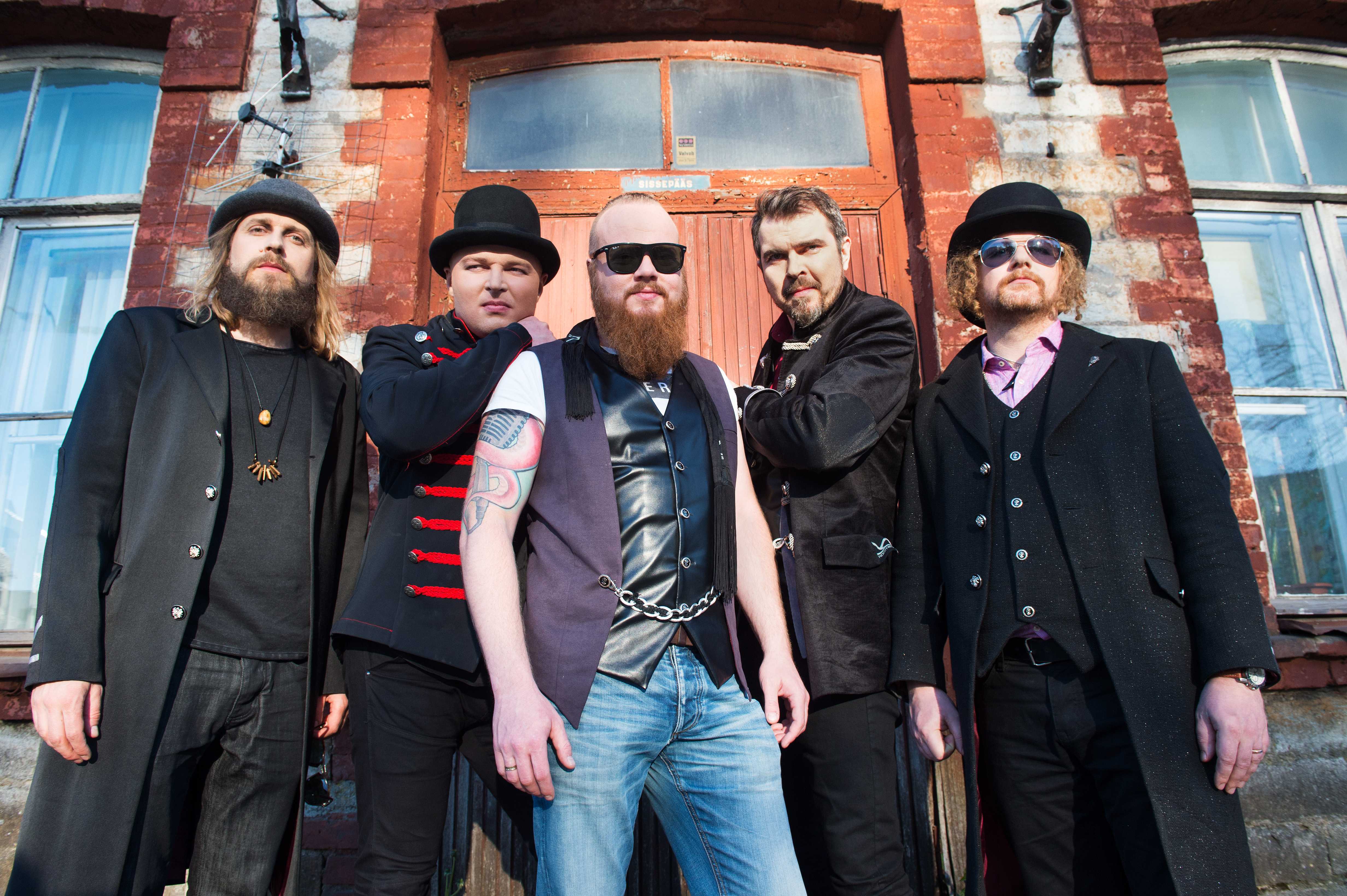 Pilt Olga Makina